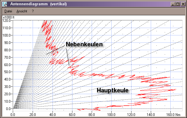 Collage eines Snapshoots von einem gemessenen vertikalen Antennendiagramm einer Parabolantenne. In dem Diagramm ist an der vertikalen Achse (y-Achse) die Höhe in feet (engl. Fuß) angetragen, in der horizontalen Achse (x-Achse) die Entfernung in Nautischen Meilen (Nm), beides Maßeinheiten, die bei einem Flugsicherungsradar verwendet werden. Die Maßeinheiten spielen aber im Diagramm nur eine untergeordnete Rolle, da es sich trotz der absoluten Zahlenangaben nur um gemessene relative Pegel handelt, die nur der Anschaulichkeit wegen (und das auch sehr willkürlich) den absoluten Werten zugeordnet wurden. (Leider kann das Programm, welches dieses Diagramm erzeugt hat, keine metrischen Maßeinheiten.) Die strahlenförmigen Geraden aus dem Ursprung sind die Höhenwinkelmarken, gezeichnet in "Ein-Grad-Schritten". Durch die Überhöhung (d.h. die vertikale Achse hat einen anderen Maßstab als die horizontale Achse) sind die Abstände zwischen den Höhenwinkelmarken ungleich. Die an der vertikalen Achse angetragenen Höhen werden in das Diagramm nicht nur als Raster, sondern auch als gepunktete Linien hineinprojiziert, wobei diese die reale Höhe über Grund andeuten und somit keine Geraden, sondern gemäß der Erdkrümmung leicht nach unten abfallende Linien sind. Das Diagramm ist ein reales Cosecans²-Diagramm eines Airport Surveillance Radars. Die „ausgefranste”, vom Ursprung weit entfernte Flanke des Diagramms, zeigt den Einfluss der Erdoberfläche auf das Diagramm (siehe Fresnelzone), da diese Antenne leider etwas zu tief aufgebaut wurde.